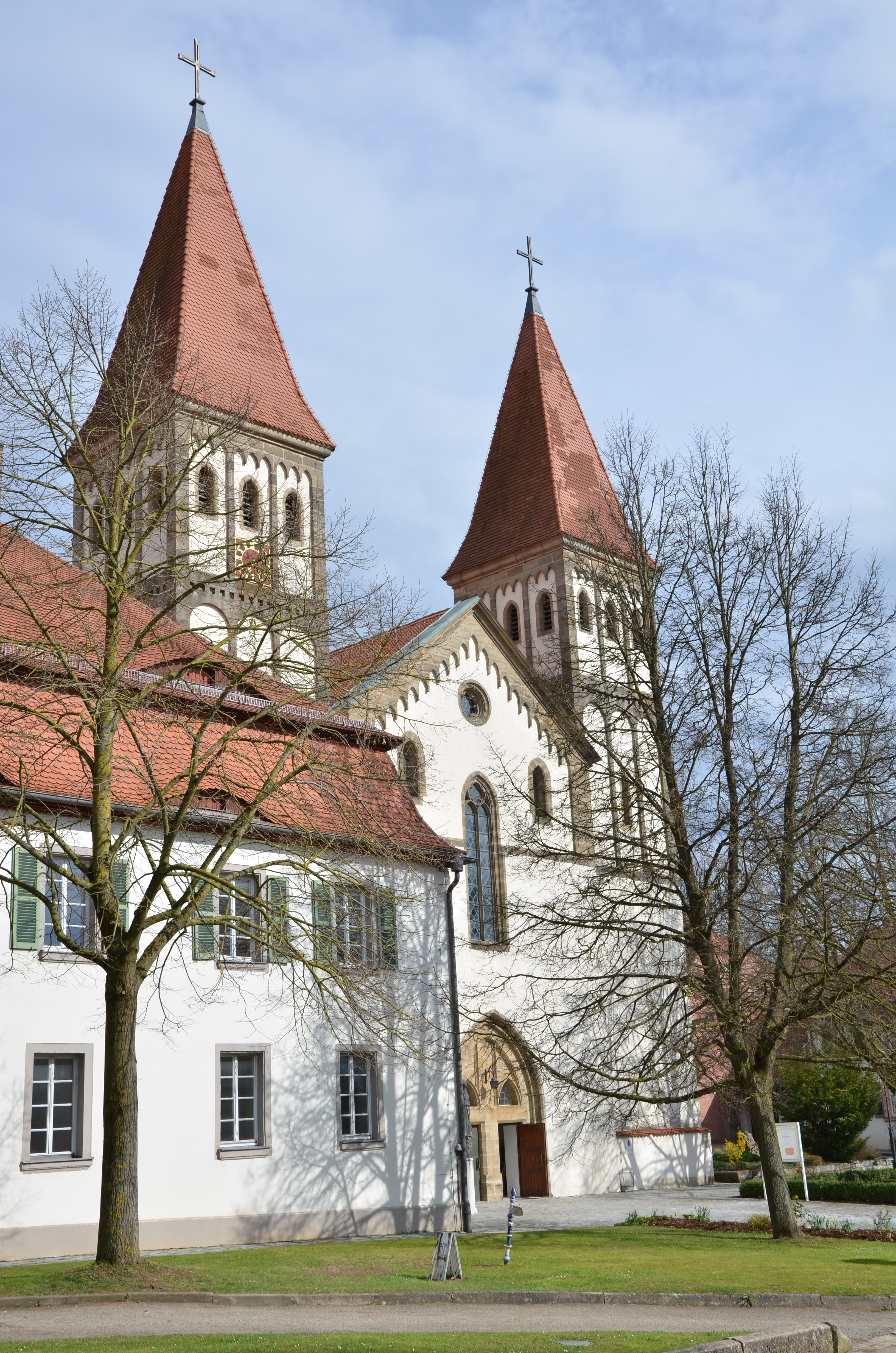 Kloster Heidenheim, Portal des Münsters